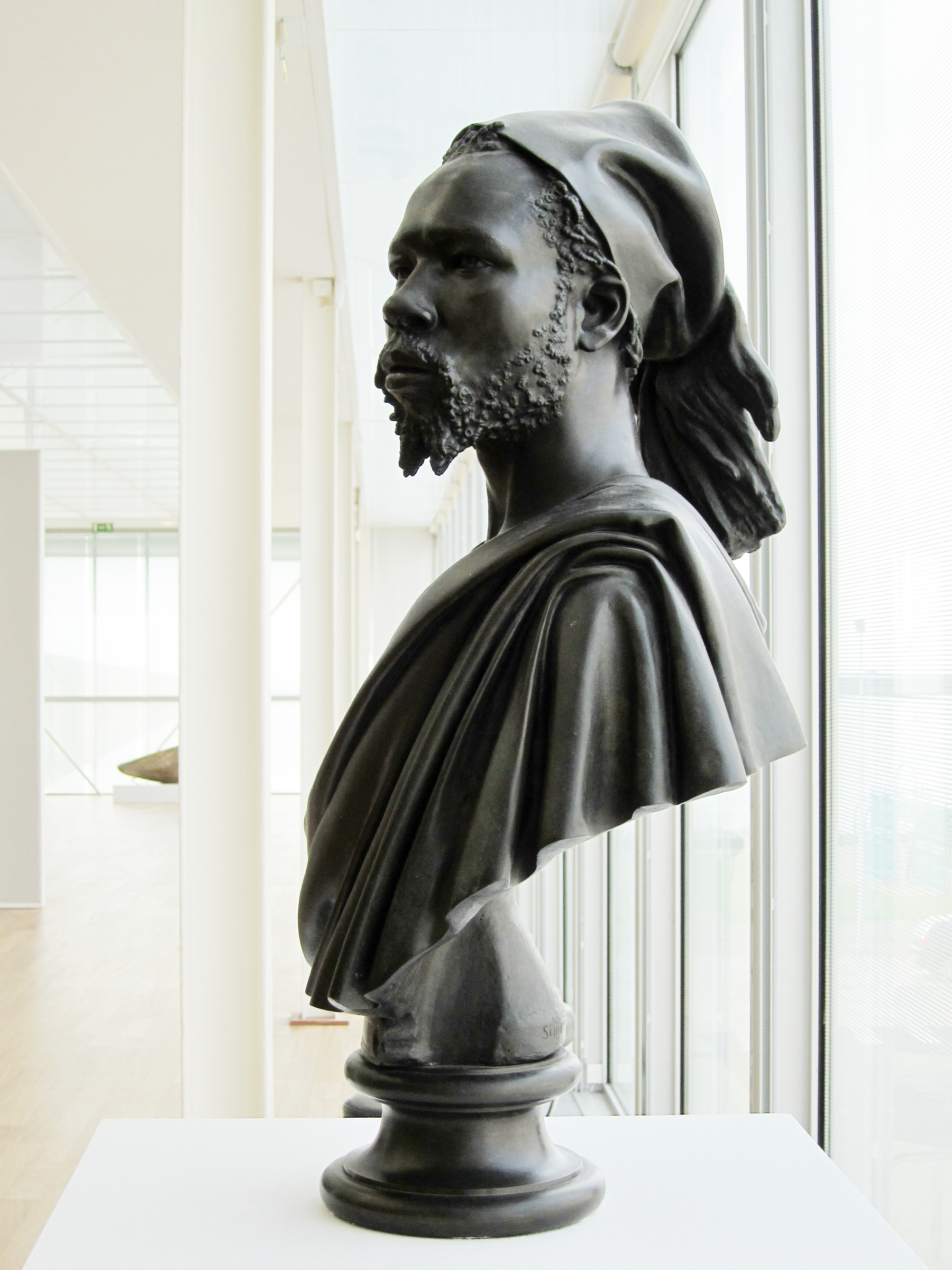 Nubien au musée des Beaux-Arts André Malraux du Havre.